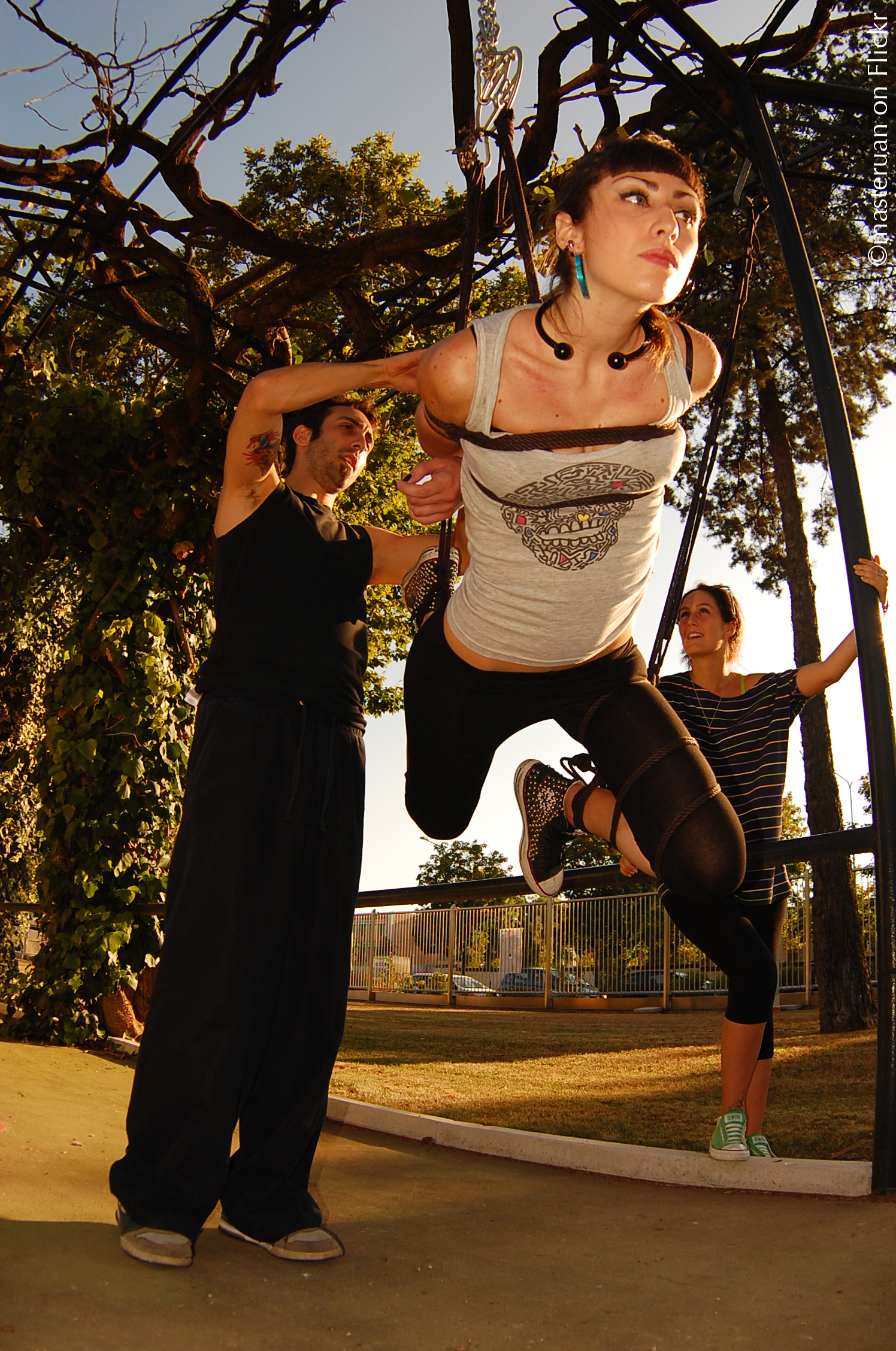 Reclaim Festival 2011 at Parco Maria Carolina Caserta ITALY. Shibari Performance.